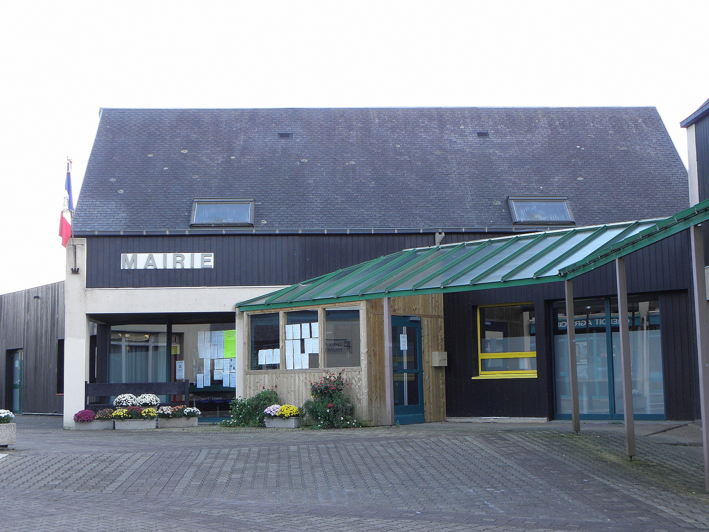 Mairie de Plouigneau (29).